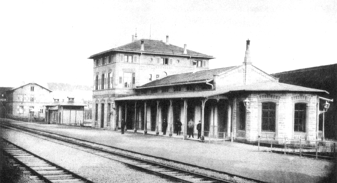 Bahnhof in Leonberg mit seinem ersten Empfangsgebäude.